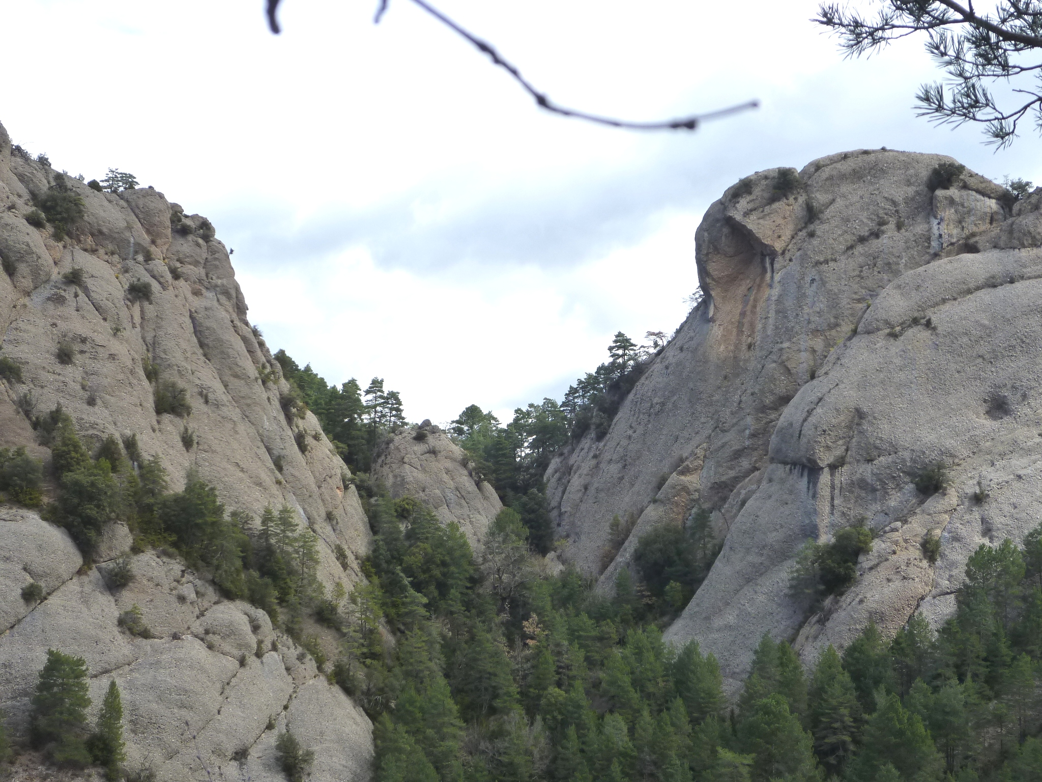 El Grauet dels Llengots, pas a la Serra dels Bastets, a Guixers (Solsonès - Catalunya)